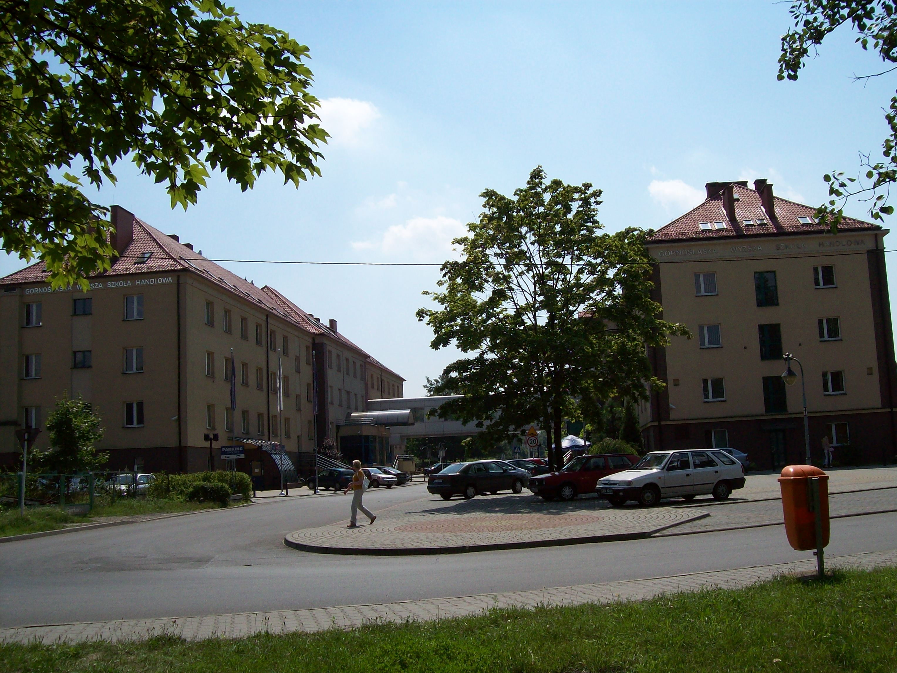 Kompleks budynków Górnośląskiej Wyższej Szkoły Handlowej w Katowicach Piotrowicach